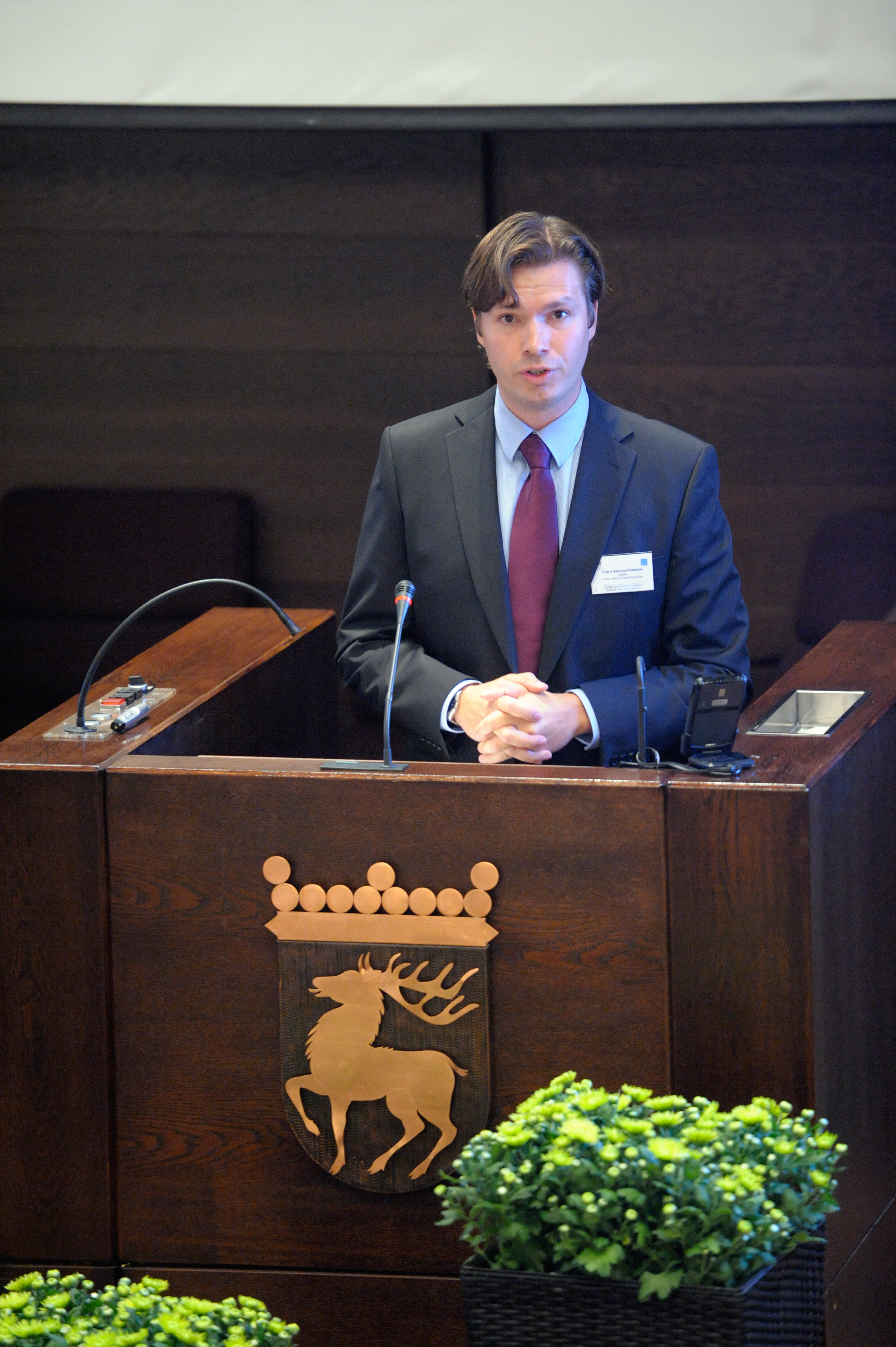 Charly Salonius-Pasternak forskare vid Finnish Institute of International Affairs